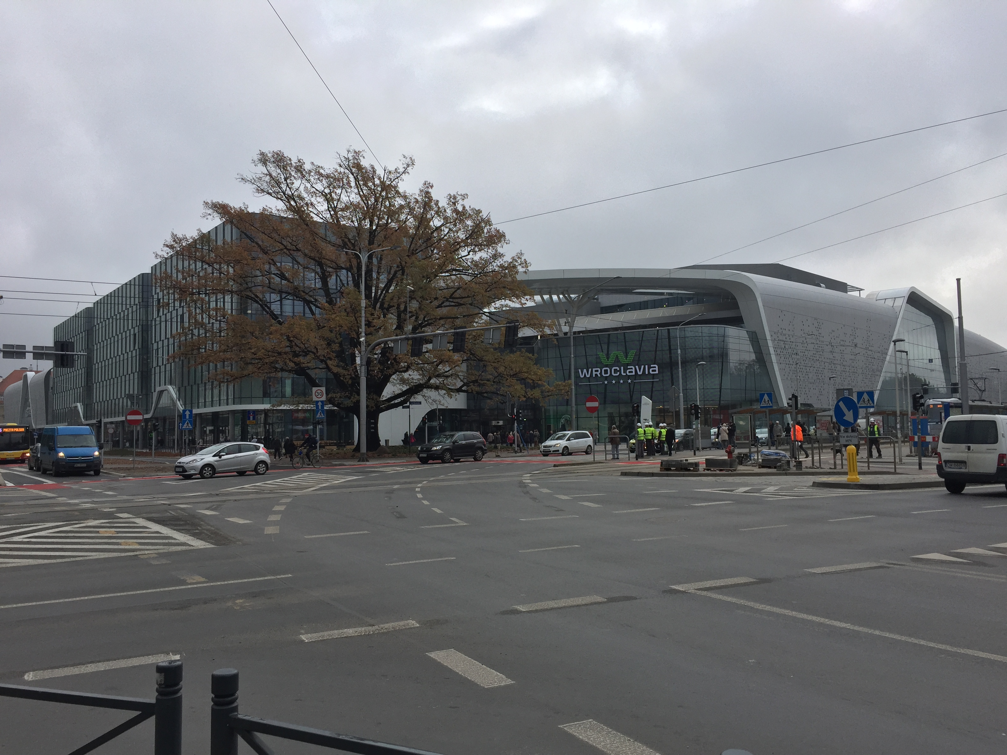 Widok na wejście główne Wroclavii